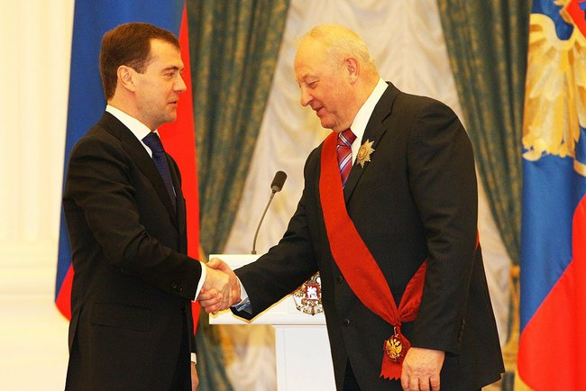 Церемония вручения государственных наград. Орденом «За заслуги перед Отечеством» I степени награждён Эдуард Россель – член Совета Федерации Федерального Собрания Российской Федерации.